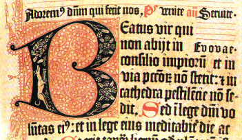 Mainz psalter